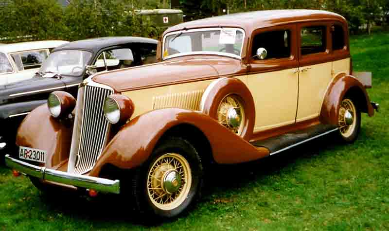 Graham Bluestreak 4-Door Sedan 1932